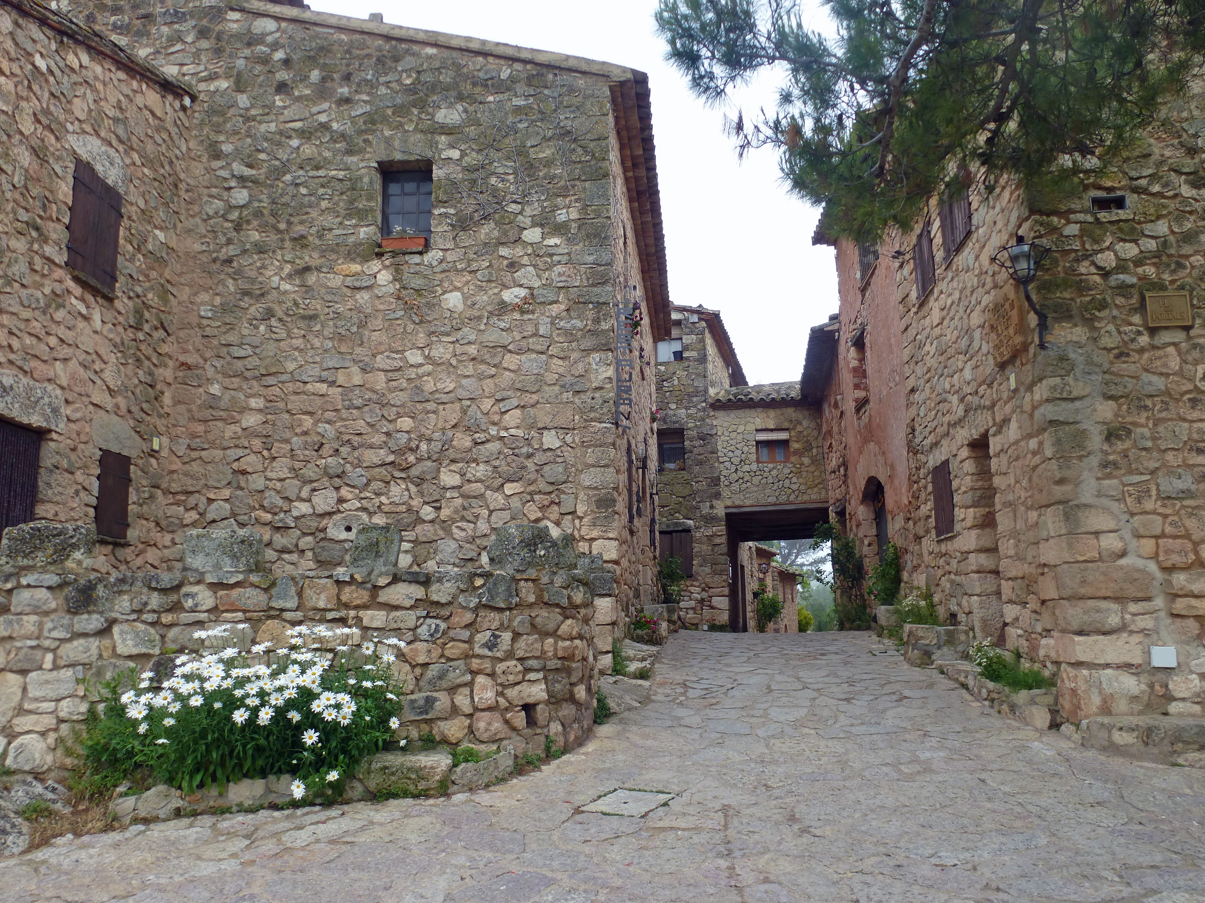 rue du village